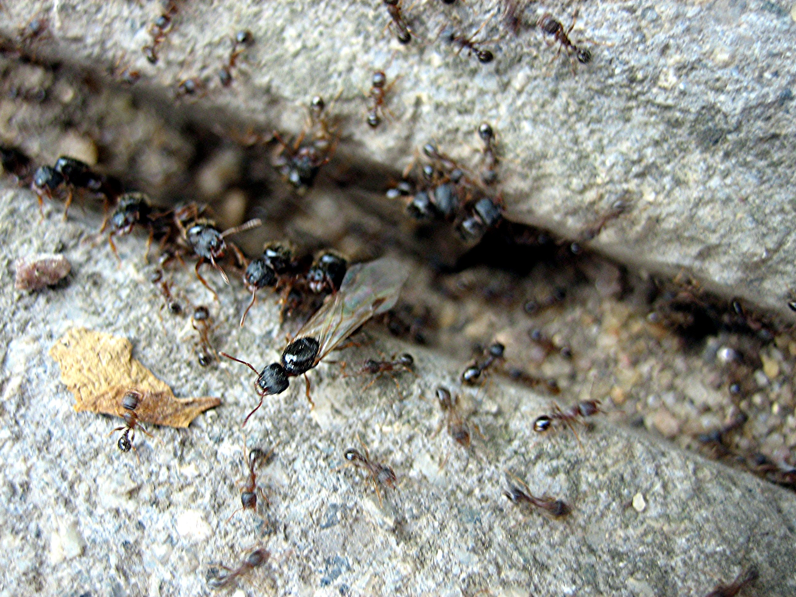 Ameistenstamm angenisstet zwischen den Fliessen auf einer Terrasse Foto wurde mit einem Fotostudio bearbeitet. Das Licht, Kontrast und Bildschärfe wurde partiell nachgebessert. Autor(en): Viktoria Erfurt Bildbeschreibung: Ameisenstamm Original Version